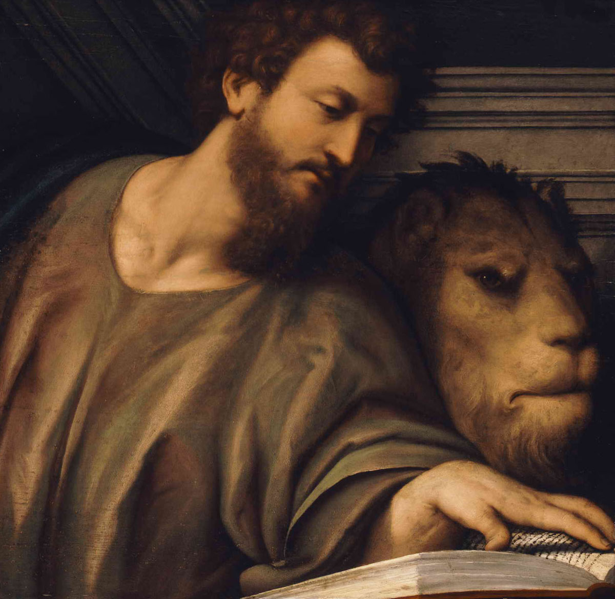 Il Pordenone - San Marco 1535 circa olio su tavola dim: 72 x 74.5 cm Museo Belle Arti - Budapest